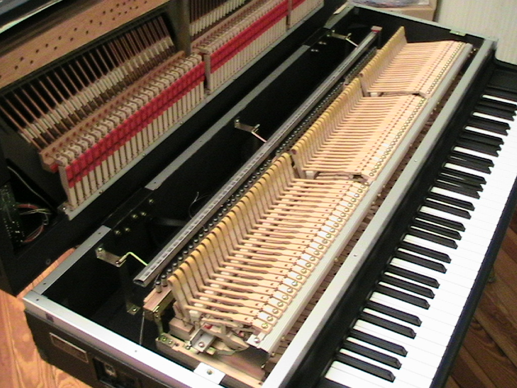 Yamaha CP-70 with opened top